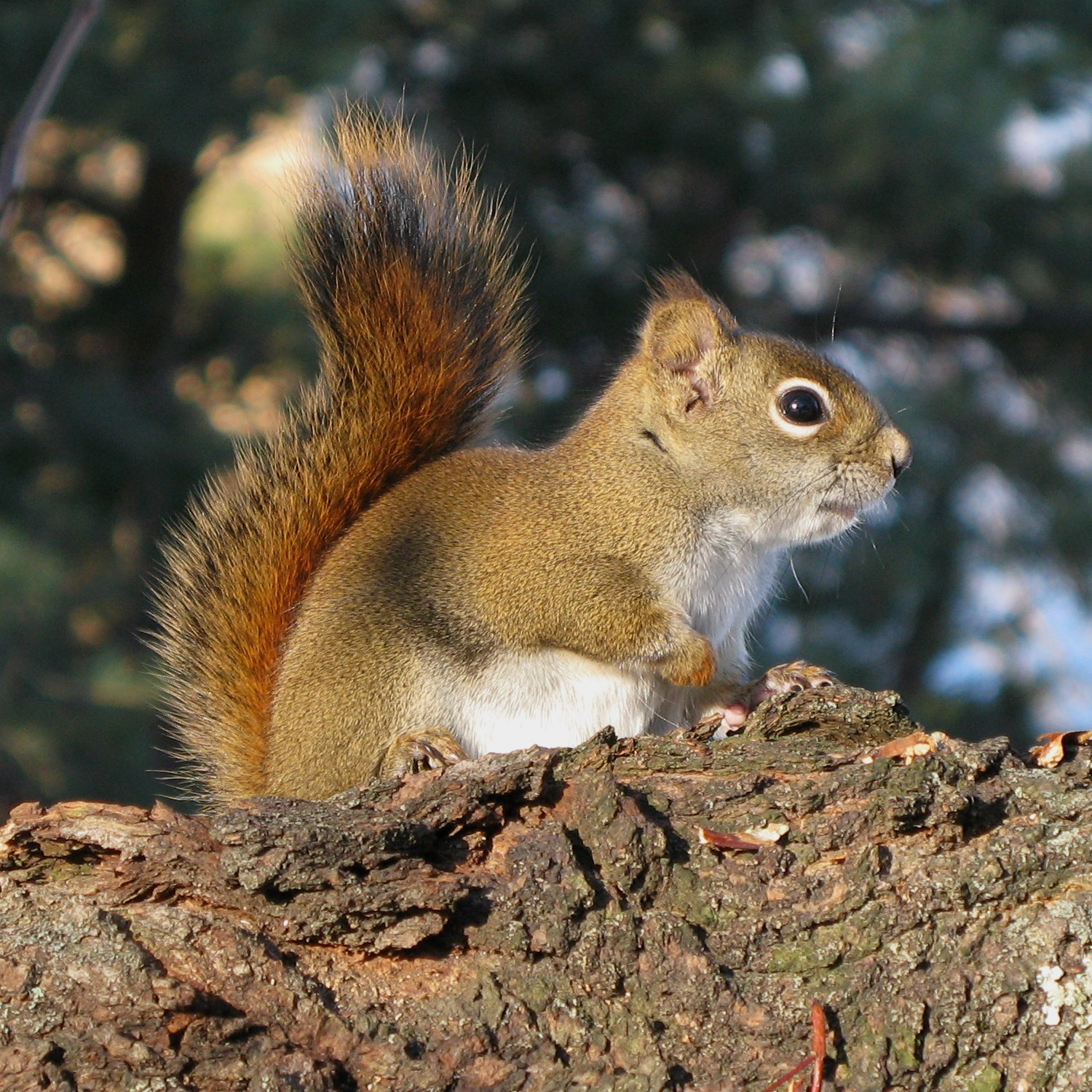 Écureuil roux nord-américain -- North American Red Squirrel Bas-Saint-Laurent -- Province de Québec -- Canada Prise en novembre 2007 -- Taken in November 2007